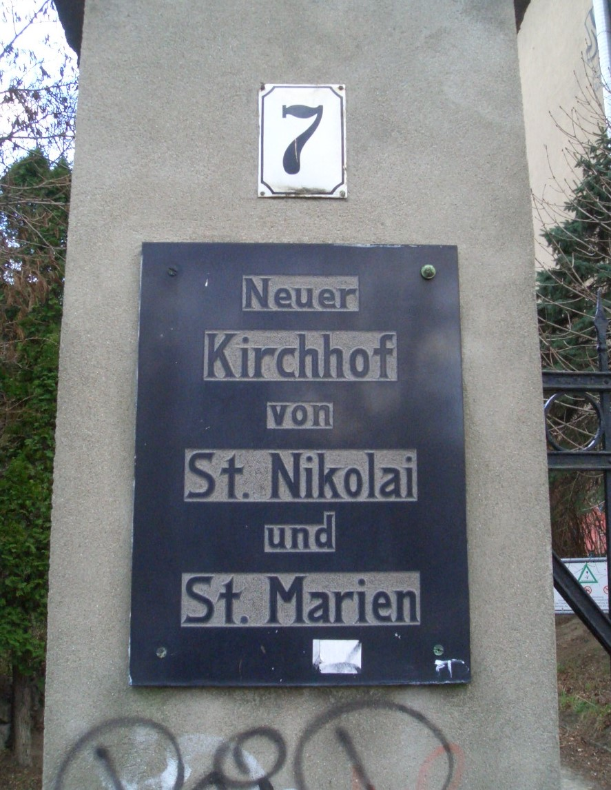 Schild am Eingang zum Neuen Kirchhof von St. Nikolai und St. Marien, in der Prenzlauer Allee 7 in Berlin-Prenzlauer Berg, im Januar 2007. Mittlerweile abgehängt